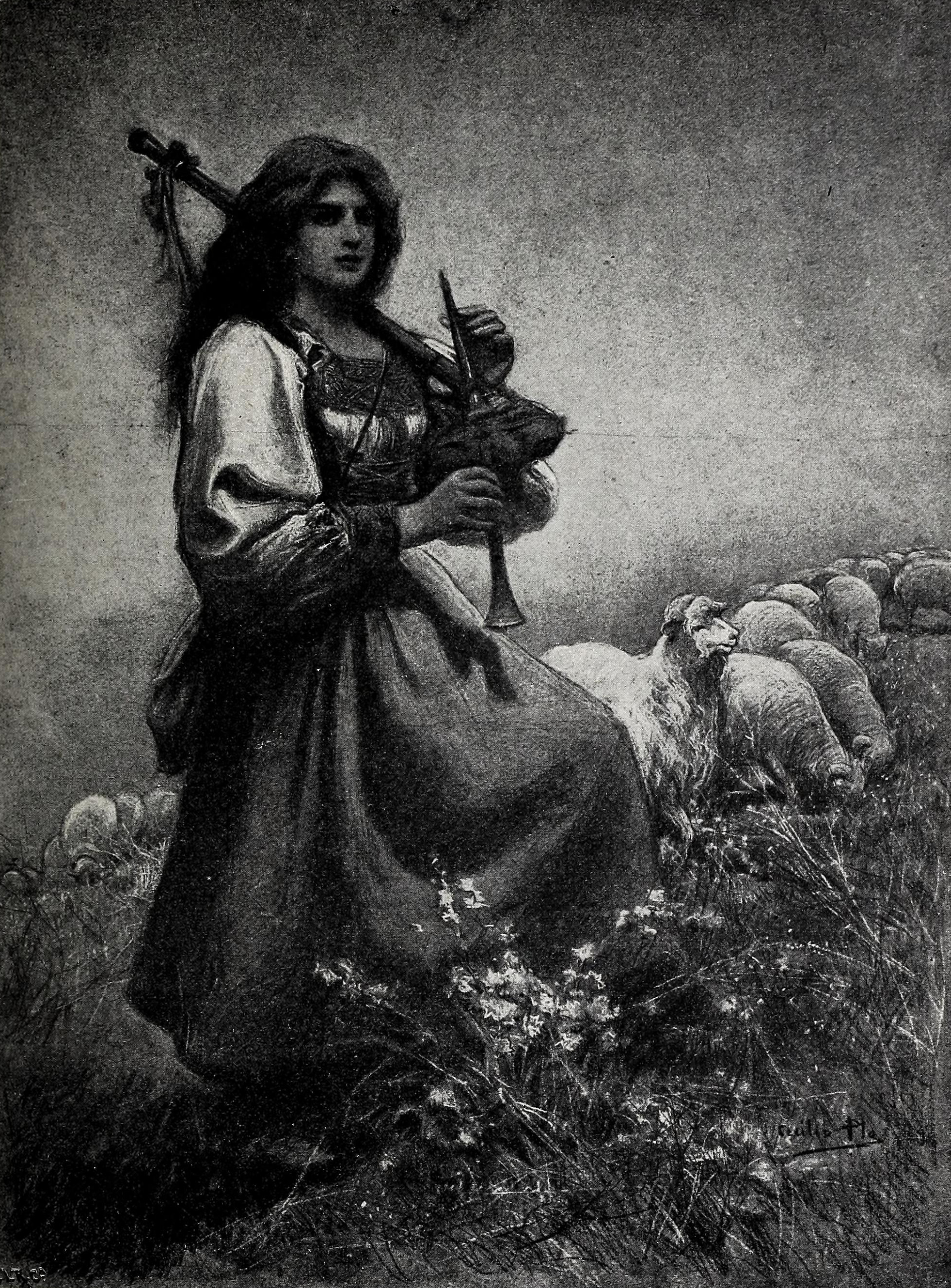 Creaciones femeninas VIII. La Galatea.